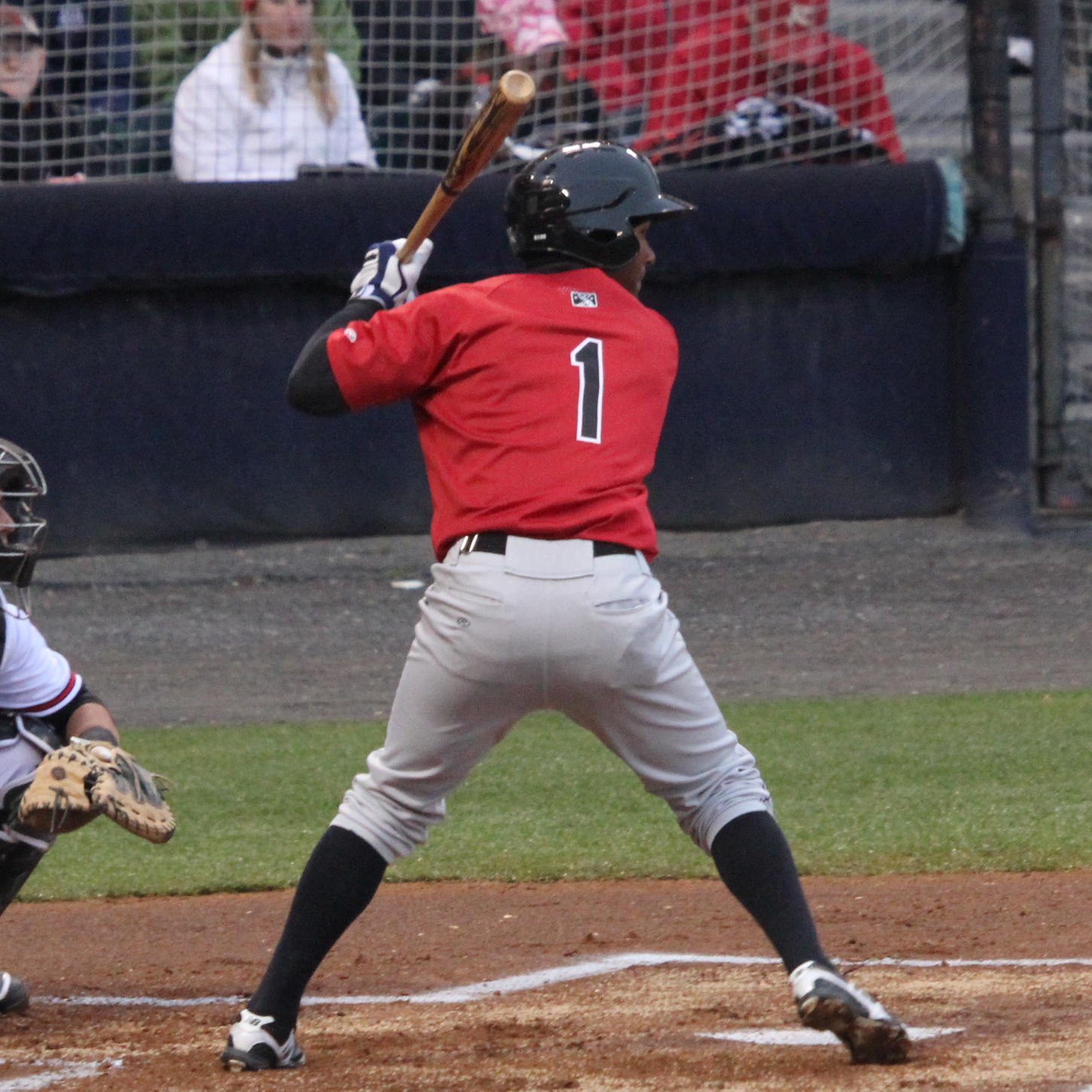 Danny Santana